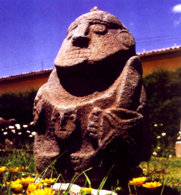 Monolito de la cultura Recuay - Perú